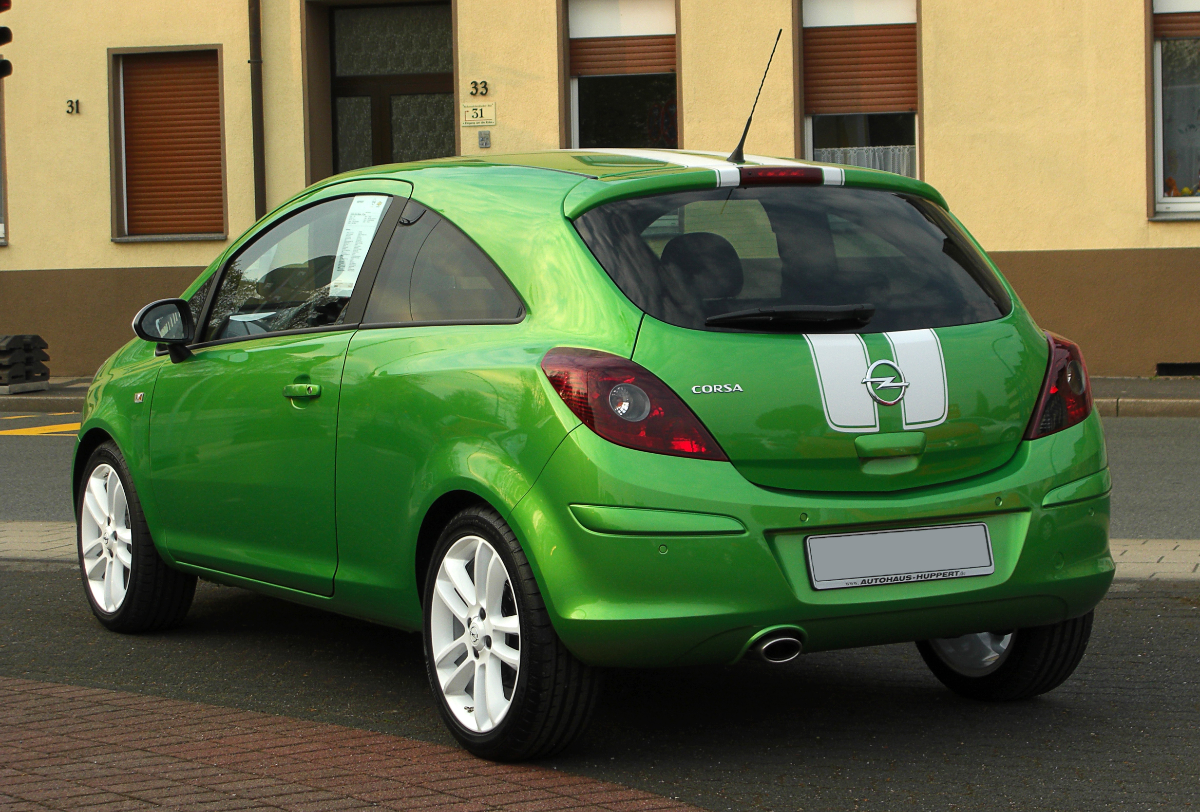 Opel Corsa 1.4 ECOTEC Color Stripes (D, Facelift)